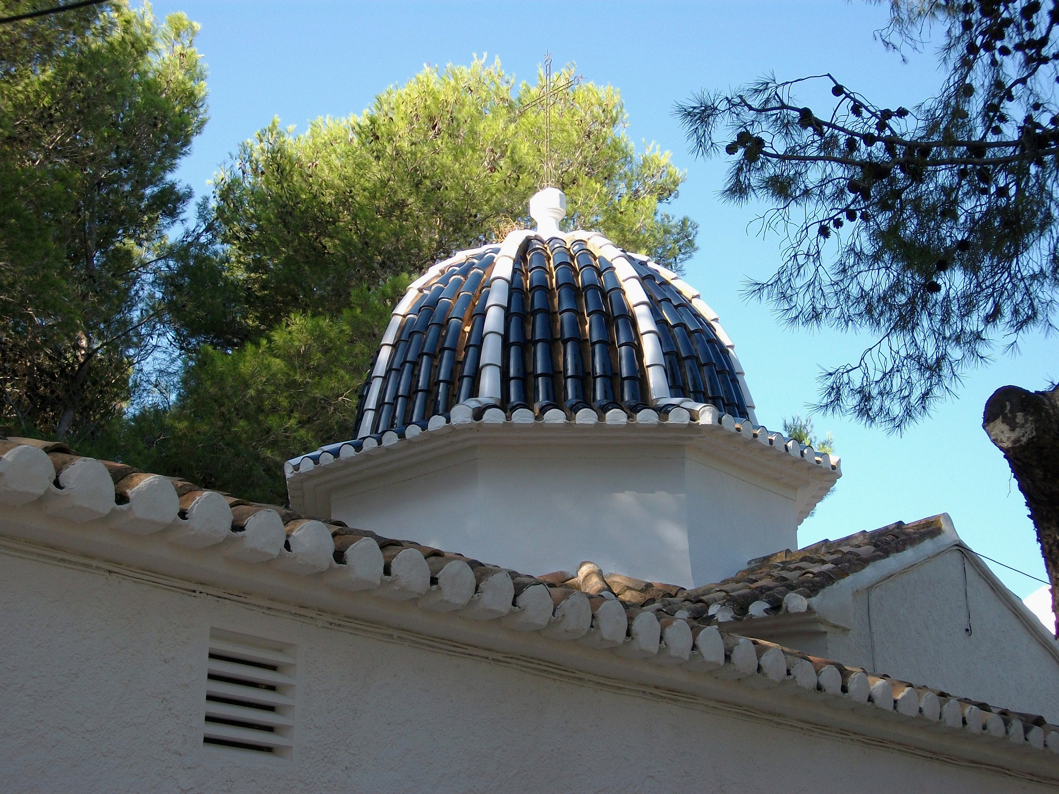 Ermita del Calvari de Gata de Gorgos, cúpula. 30.071-011.